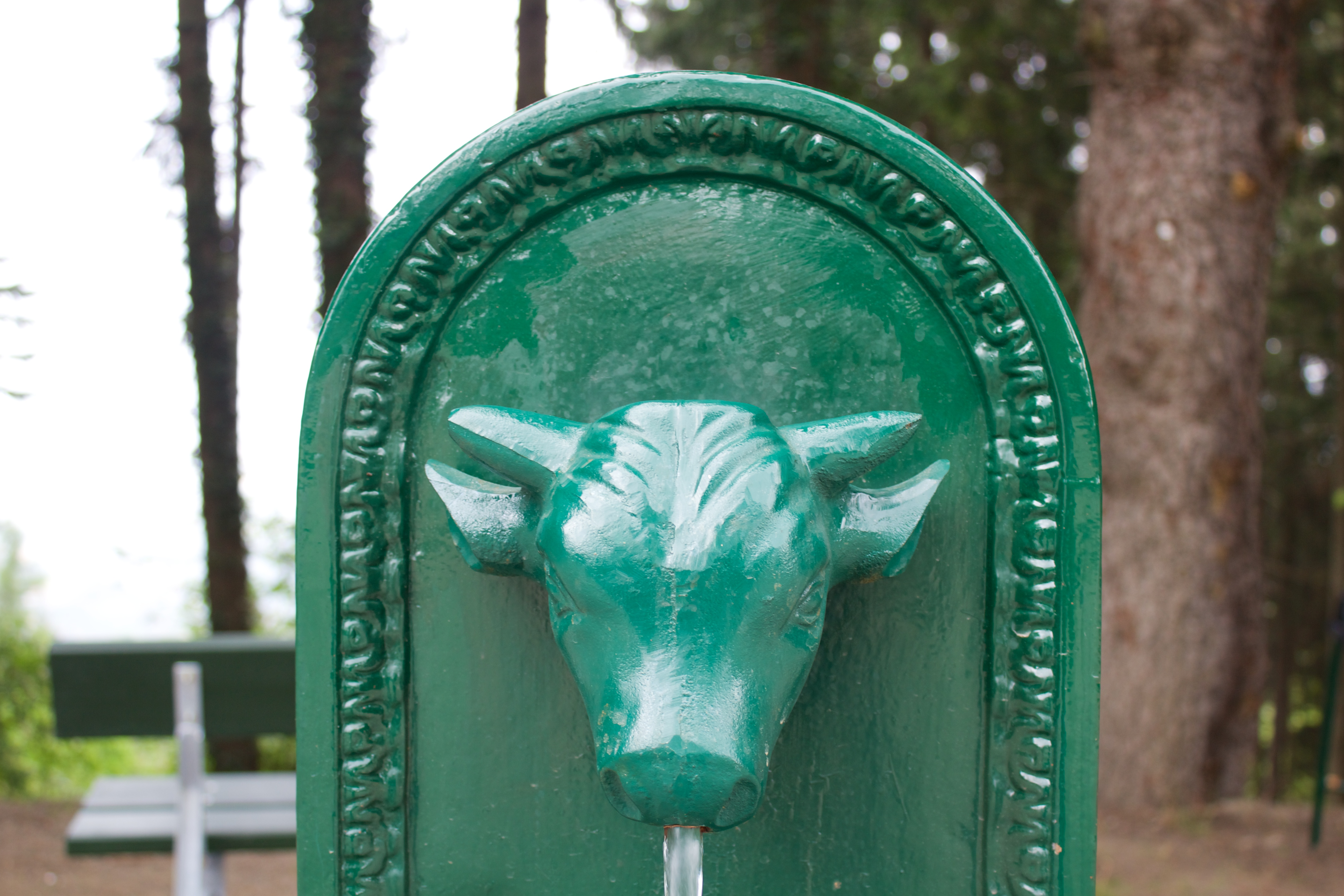 Toret presso Bric Paluc